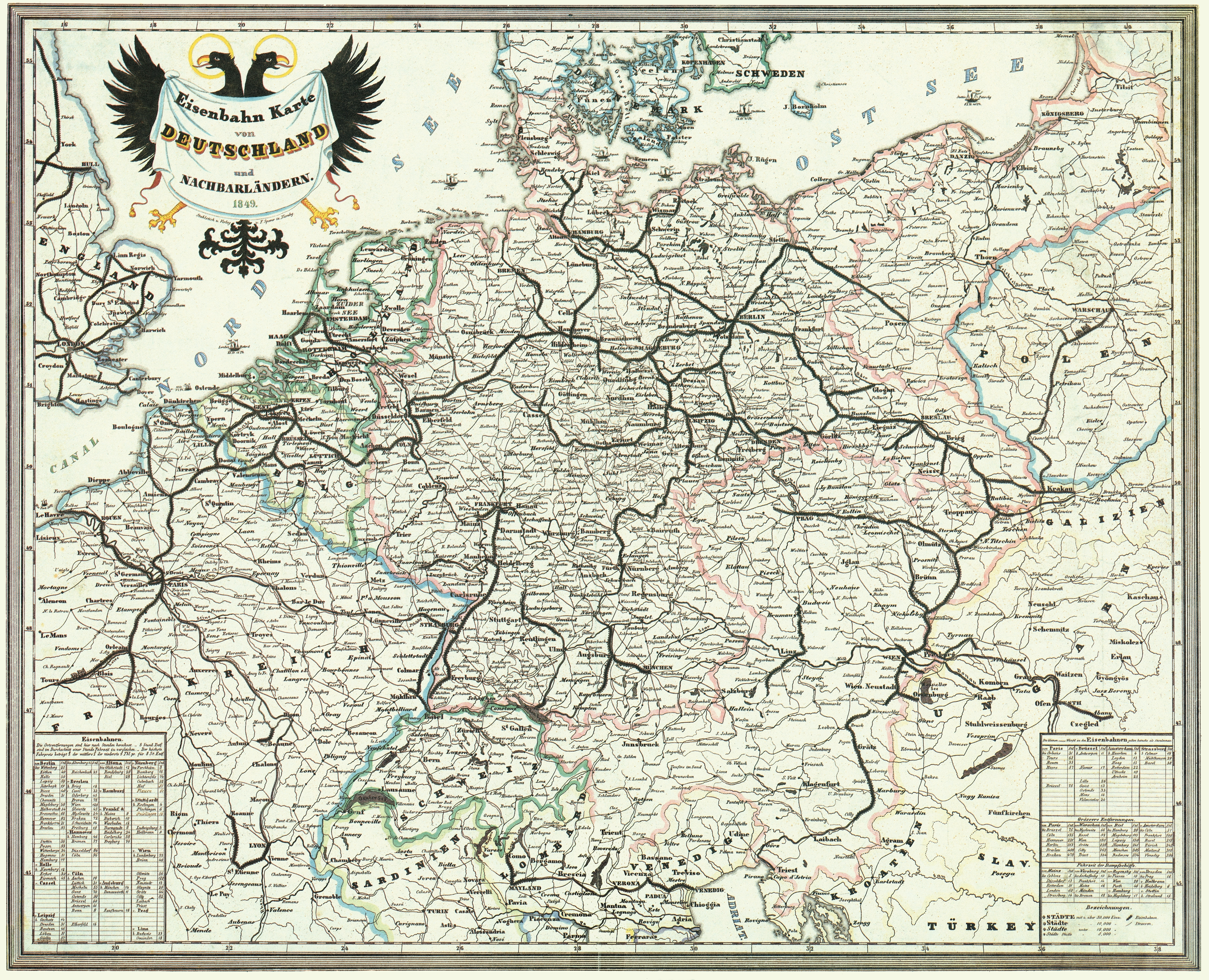 Bahnkarte von Deutschland und Nachbarländern 1849. Dünne Linien sind Straßen.